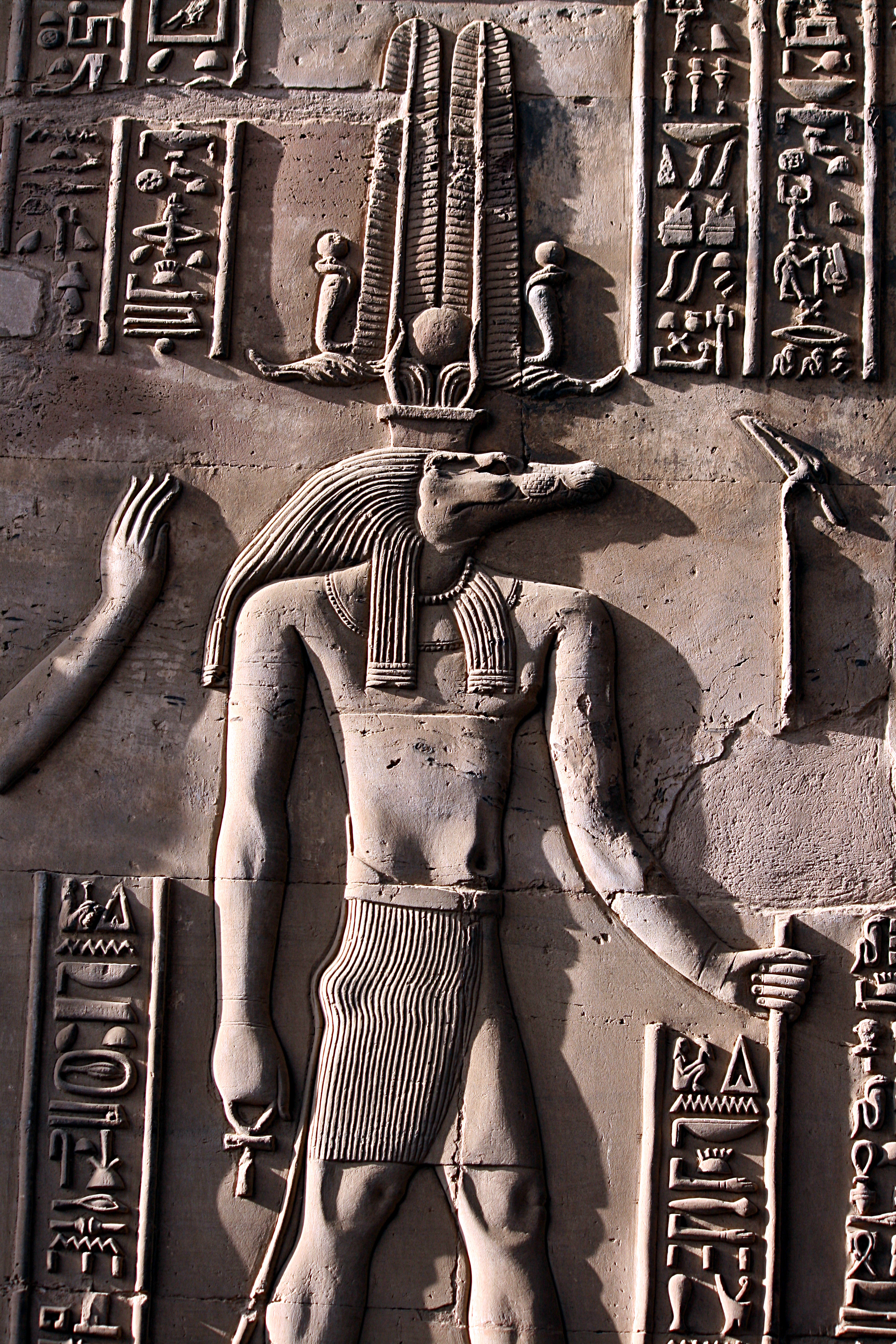 Tempel von Kom Ombo: Relief des Krokodilgottes Sobek